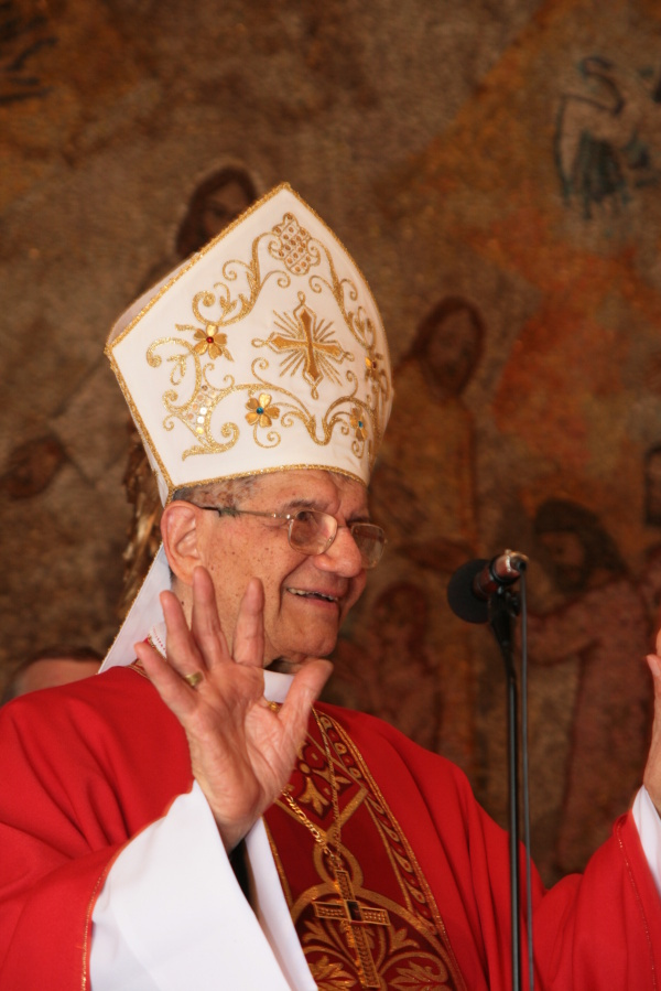 Giovanni Coppa ve Zlíně 2008